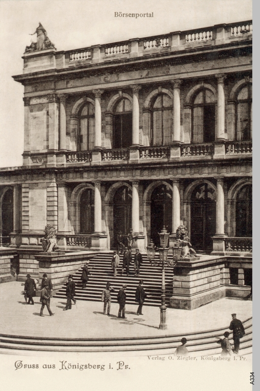 Börse in Königsberg